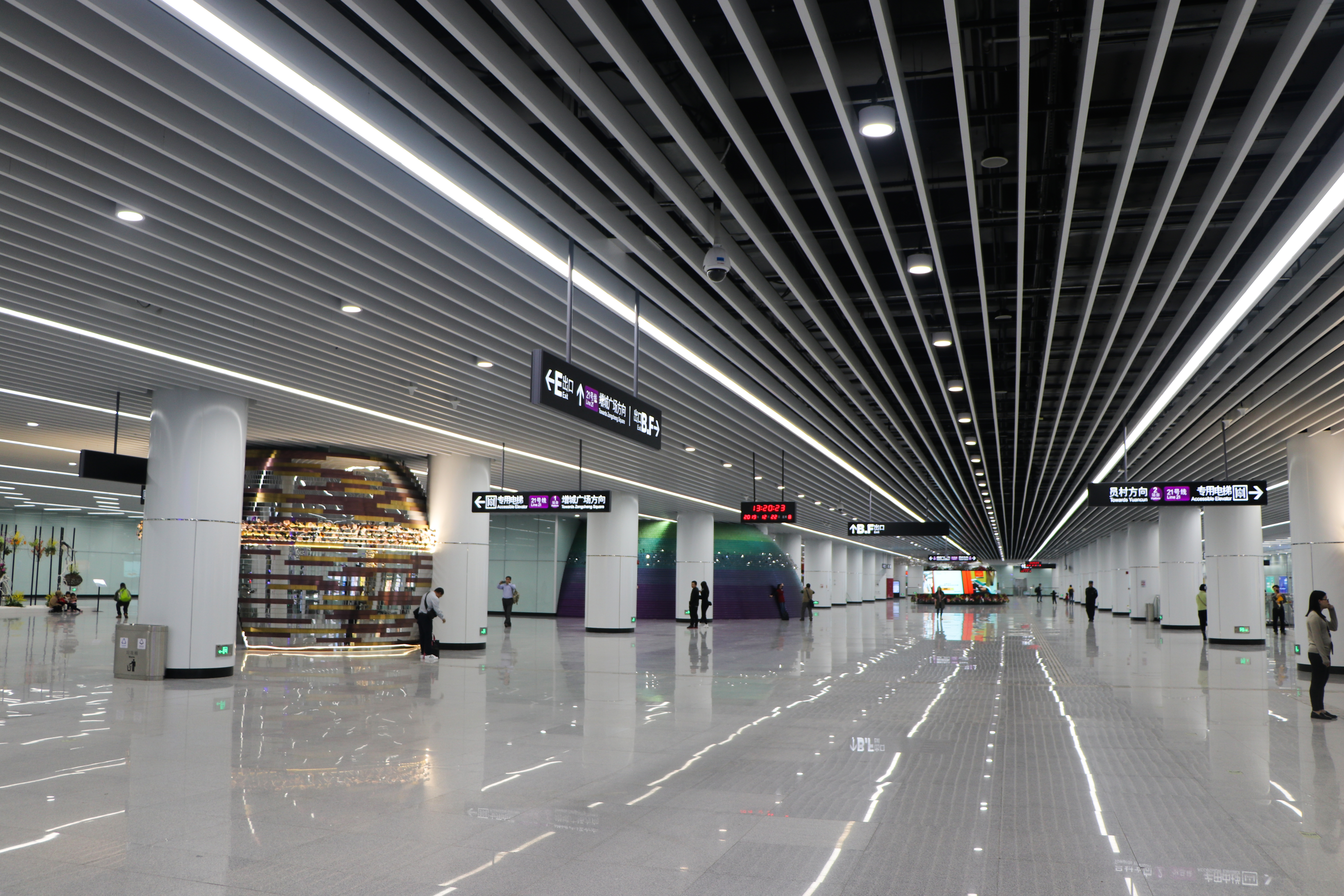 广州地铁天河公园站